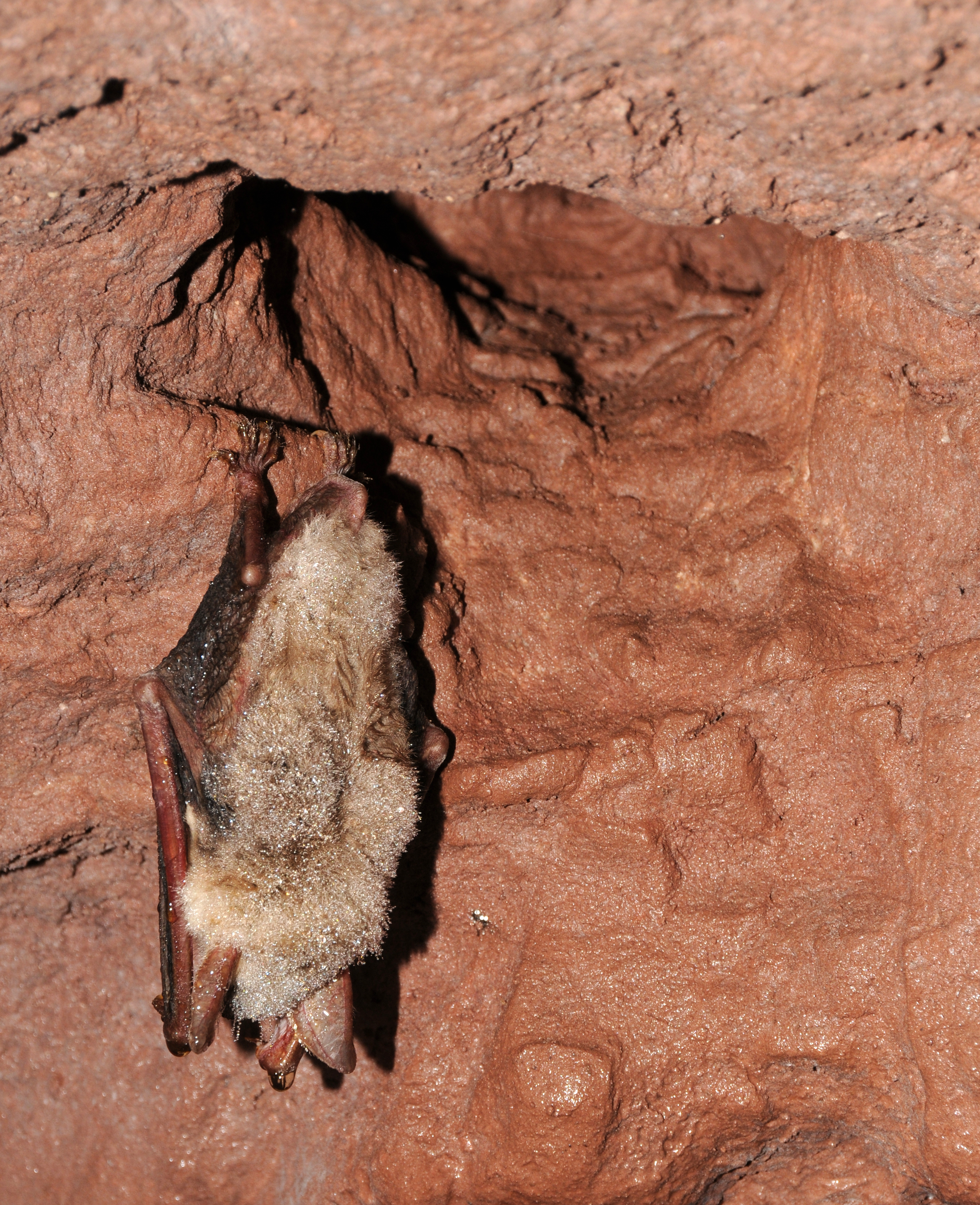 Chauve-souris (Grand murin).